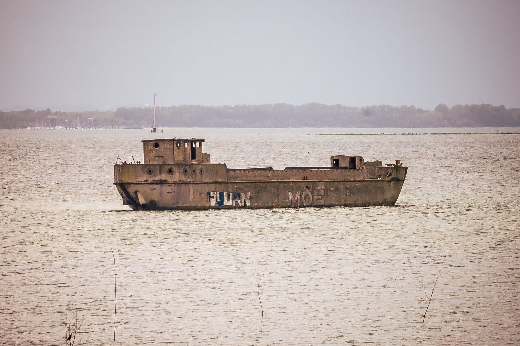 Gestrandetes Betonschiff in der Wismarer Bucht (Ostsee) vor Redentin